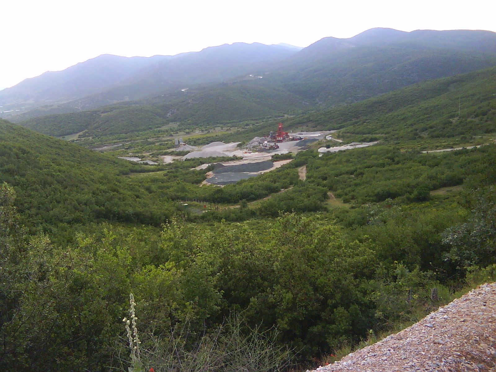 Рудник за варовник Татарли Чука, во Татарли, Валансовско